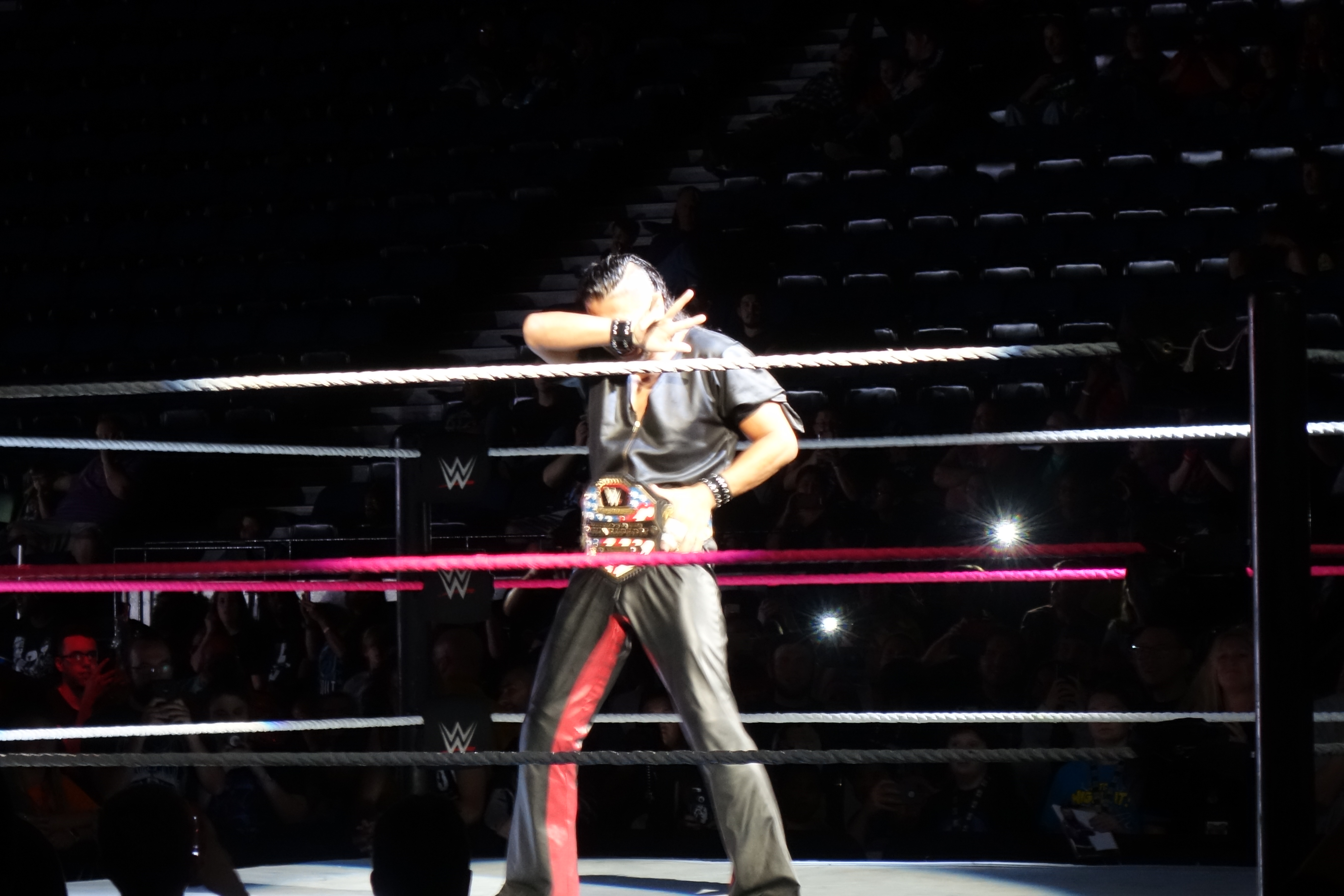 Shinsuke Nakamura entrant sur le ring avec la ceinture de champion des Etats Unis de la WWE